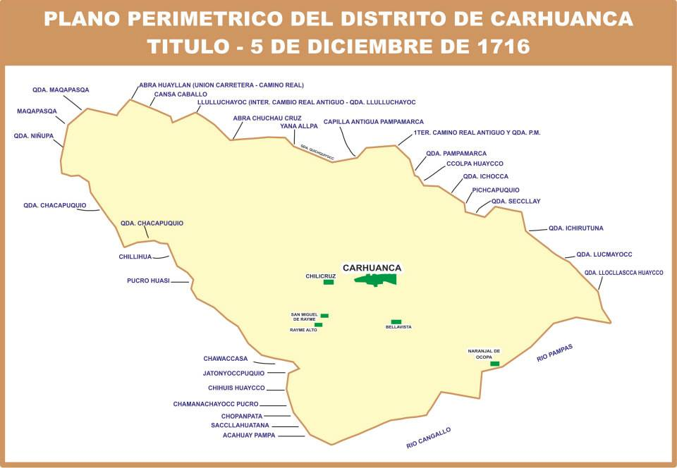 PLANO PERIMETRICO DEL DISTRITO DE CARHUANCA TITULO - 5 DE DICIEMBRE DE 1716